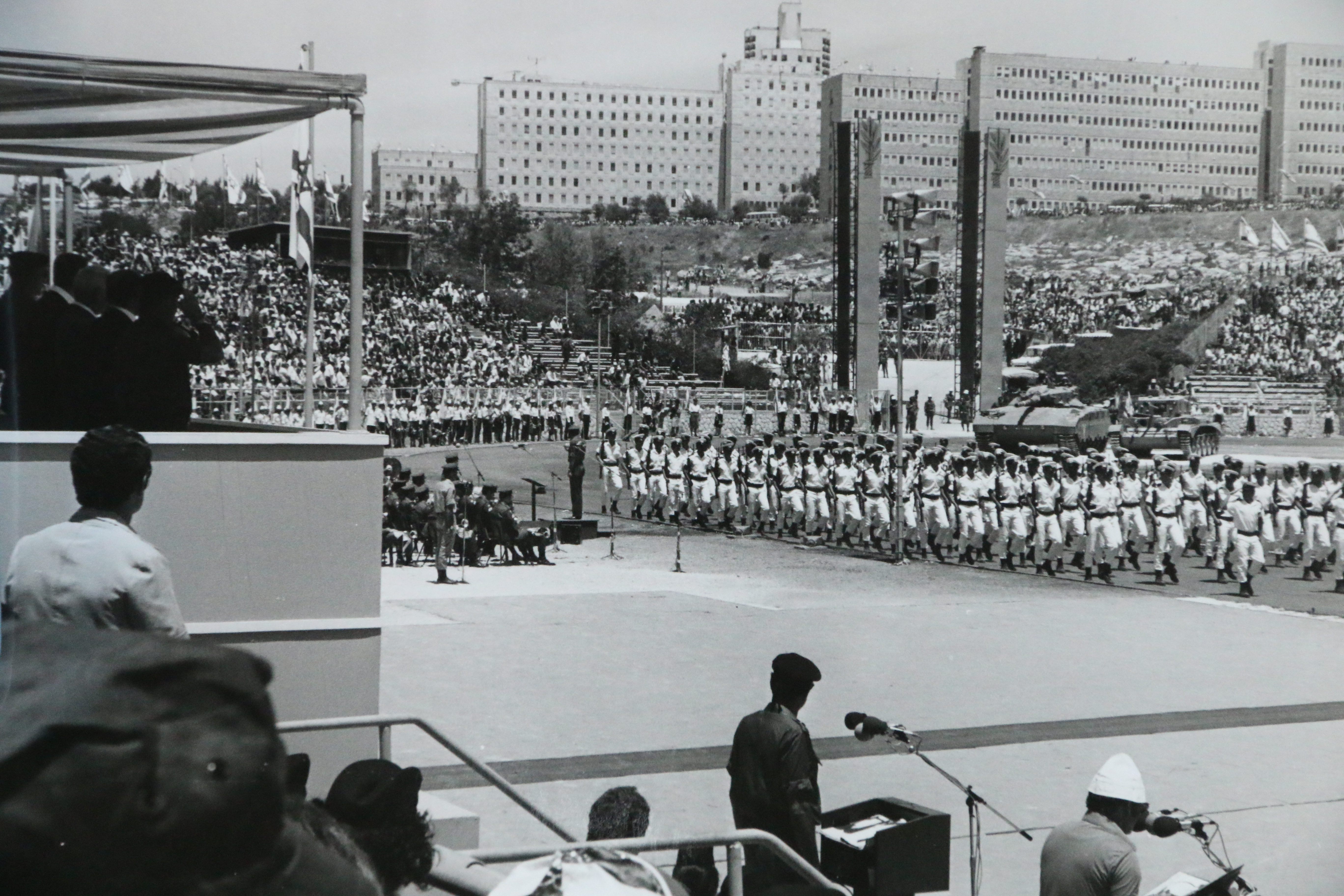 המצעד הצבאי בגבעת רם 1978 - ירושלים, לחגיגות 30 שנה לעצמאות ישראל. במעמד כל ראשי ישראל ובניהולו של מר יהודה אילן, מנהל ההסברה והטקסים הממלכתיים בישראל